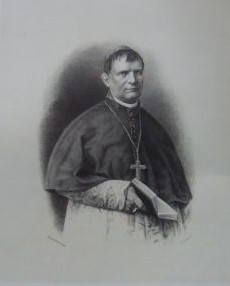 Immagine personale